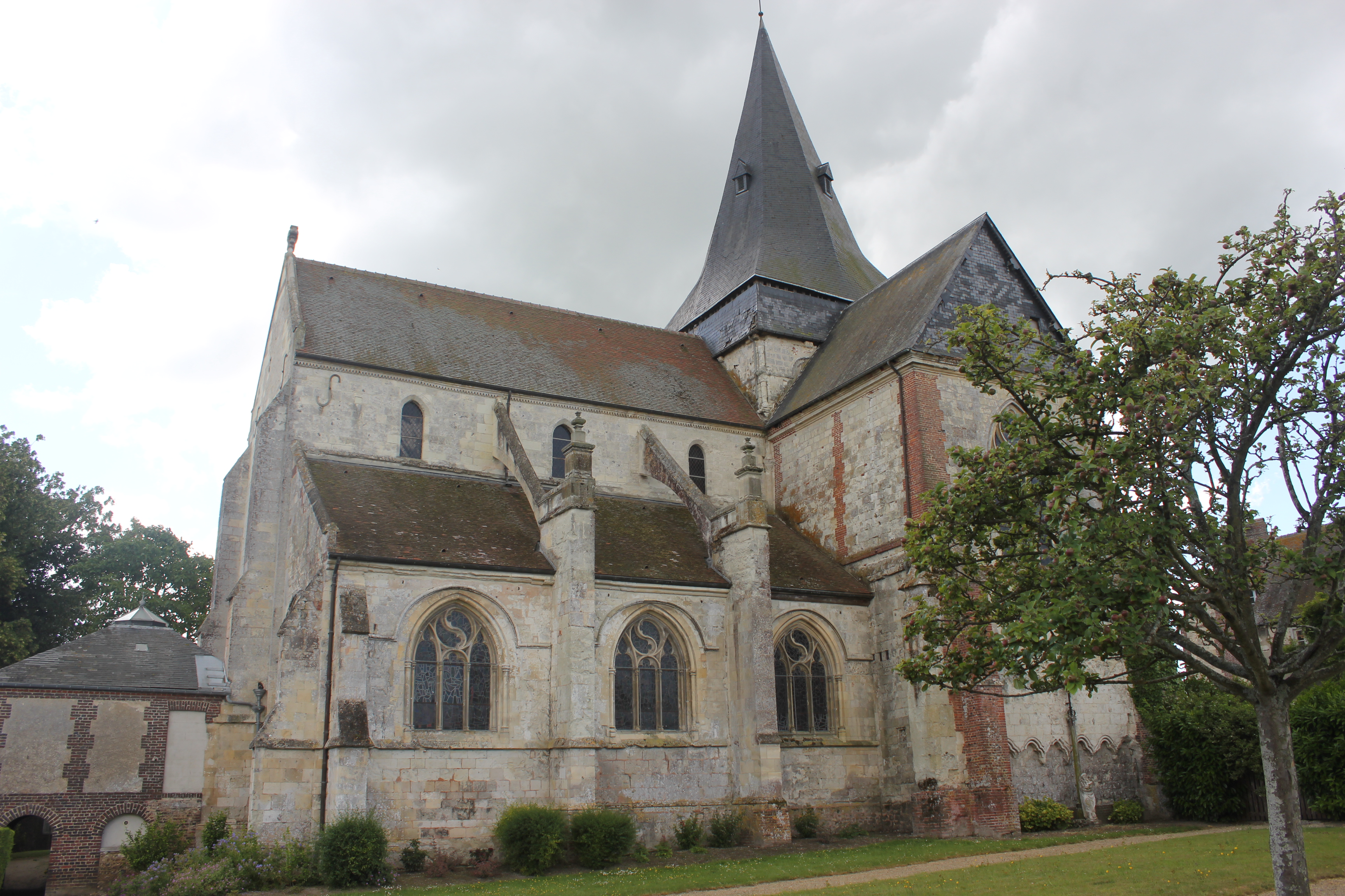 Église Saint-Sauveur de Beaumont-en-Auge (Calvados).